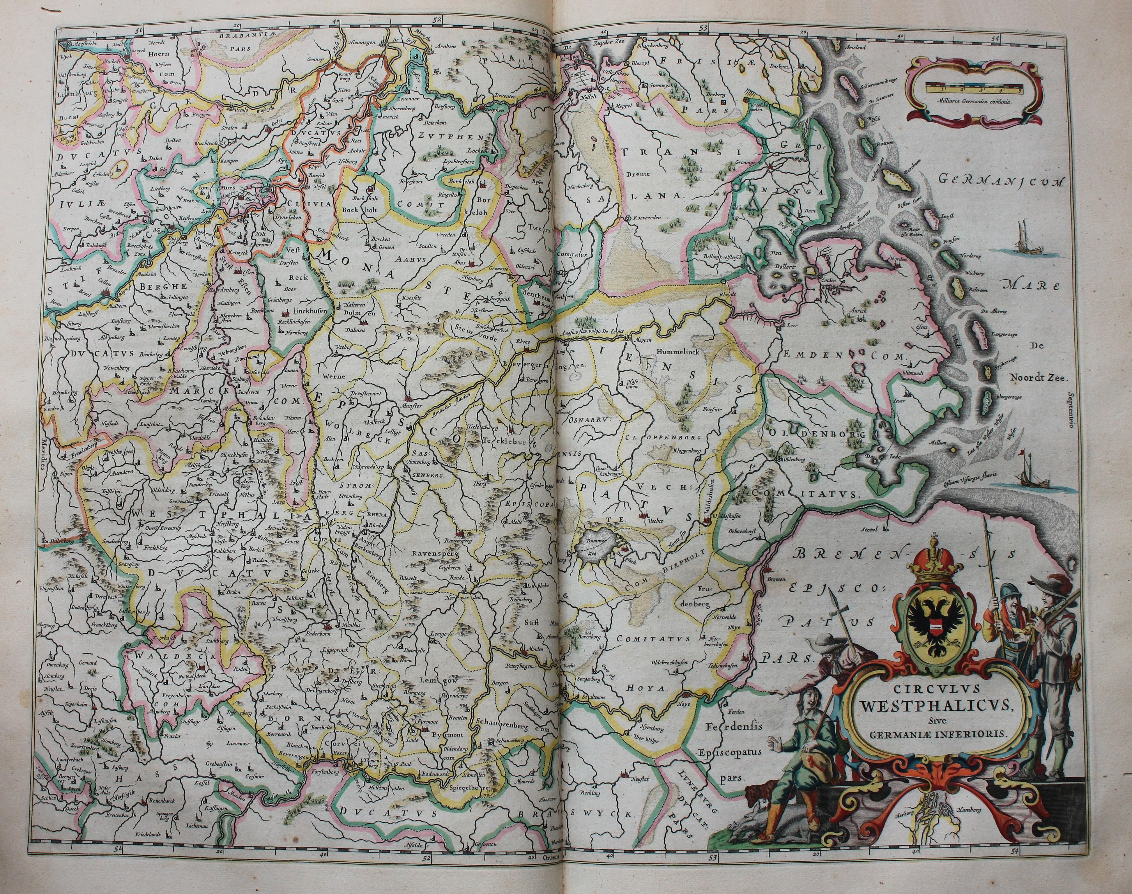 Descripción bibliográfica: Geographia Blaviana. - [Amsterdam : Juan Blaeu, 1659] . - [32], VI, 96 p., 34 f., h. 35a, 35b, 35c, 35d, 36-44 f., 34, [2], 36-40, [2], 43-70 [i. e. 75], [1] f., [20] p. de map., [9] f. de map., [4] f. pleg. de map., [2] f. de plan., [2] f. ge grab. : |bil. ; |cFol. marca major (57 cm.) . - En la dedicatoria a Felipe IV: "Presenta ... El Atlas Universal y Cosmographico de los orbes y terrestre ... Juan Blaeu" . - Título tomado del frontispicio. -- Privilegio fechado en 1659. -Errores de pag. - Sign.: 1, *2, **3, ***-****2, a-e2, A-I2, K1, L-Z2, Aa-Dd2, 4 2, Ee-Ff2, A-I2, K1, L2, M1, N-Y2, Z5, Aa-Dd2, Ee1, A-D2, E-F1, G-I2, K-L1, M-O2, P1, Q-Z2, Aa-Bb2, Cc1, Dd3, Ff-Zz2, Aaa-Bbb2, . - Frontispicio grab. col. -- Incluye un total de 49 il. entre map., plan. i grab. Materia: Atlas - Obras anteriores a 1800 Impresor: Blaeu, Joan, 1596-1673, imp. Lugar de impresión: Holanda. Amsterdam Localización: Vea la ilustración en su contexto Visite también la exposición "Cartografía histórica en la Biblioteca de la Universidad de Sevilla"